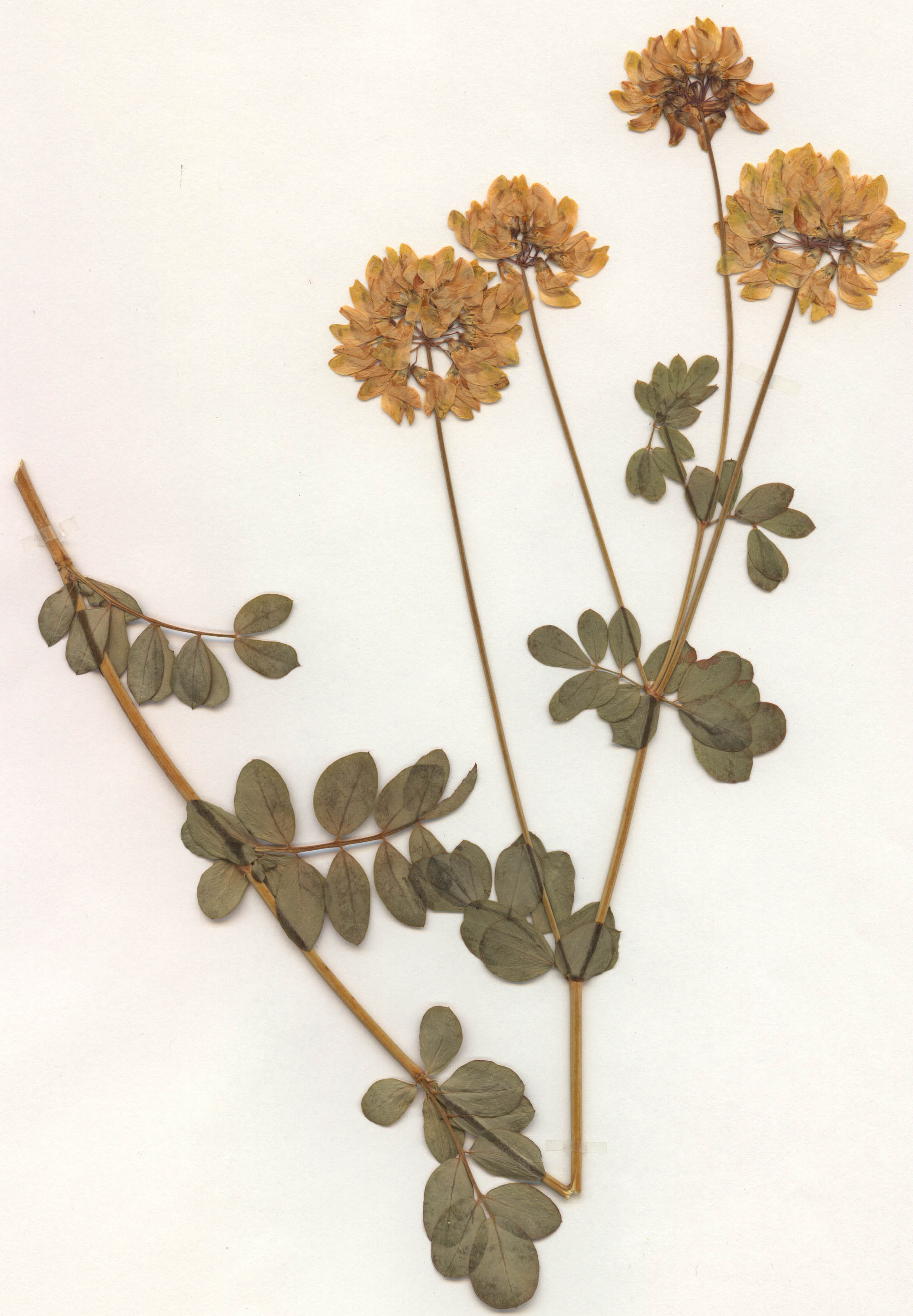 Coronilla coronata, eigener Herbarbeleg